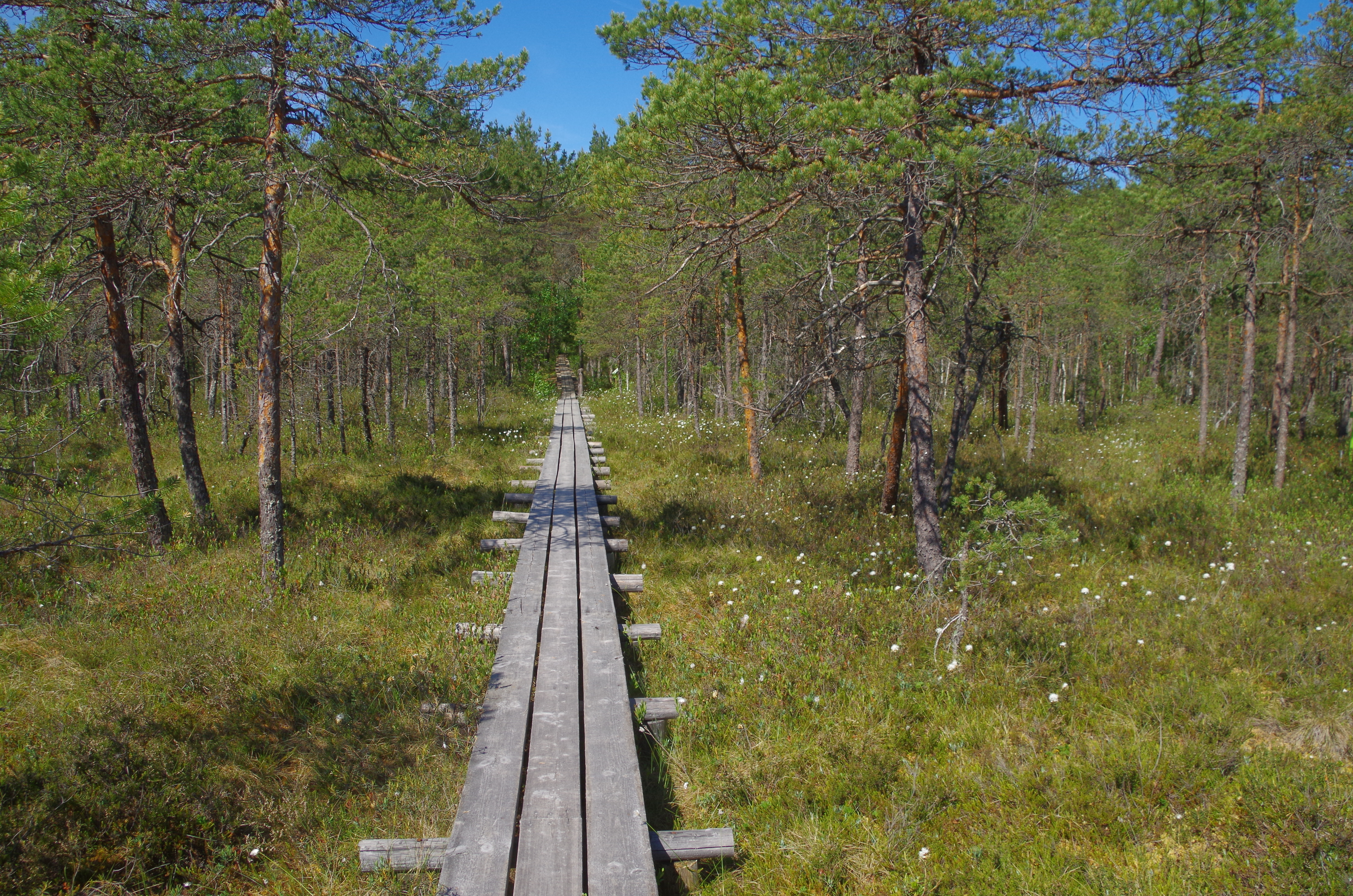 Männikjärve raba asub Endla looduskaitsealal. Endla looduskaitseala laiub kolme maakonna territooriumil: Jõgevamaal, Järvamaal ja Lääne-Virumaal. Männikjärve raba jääb Jõgeva maakonda.